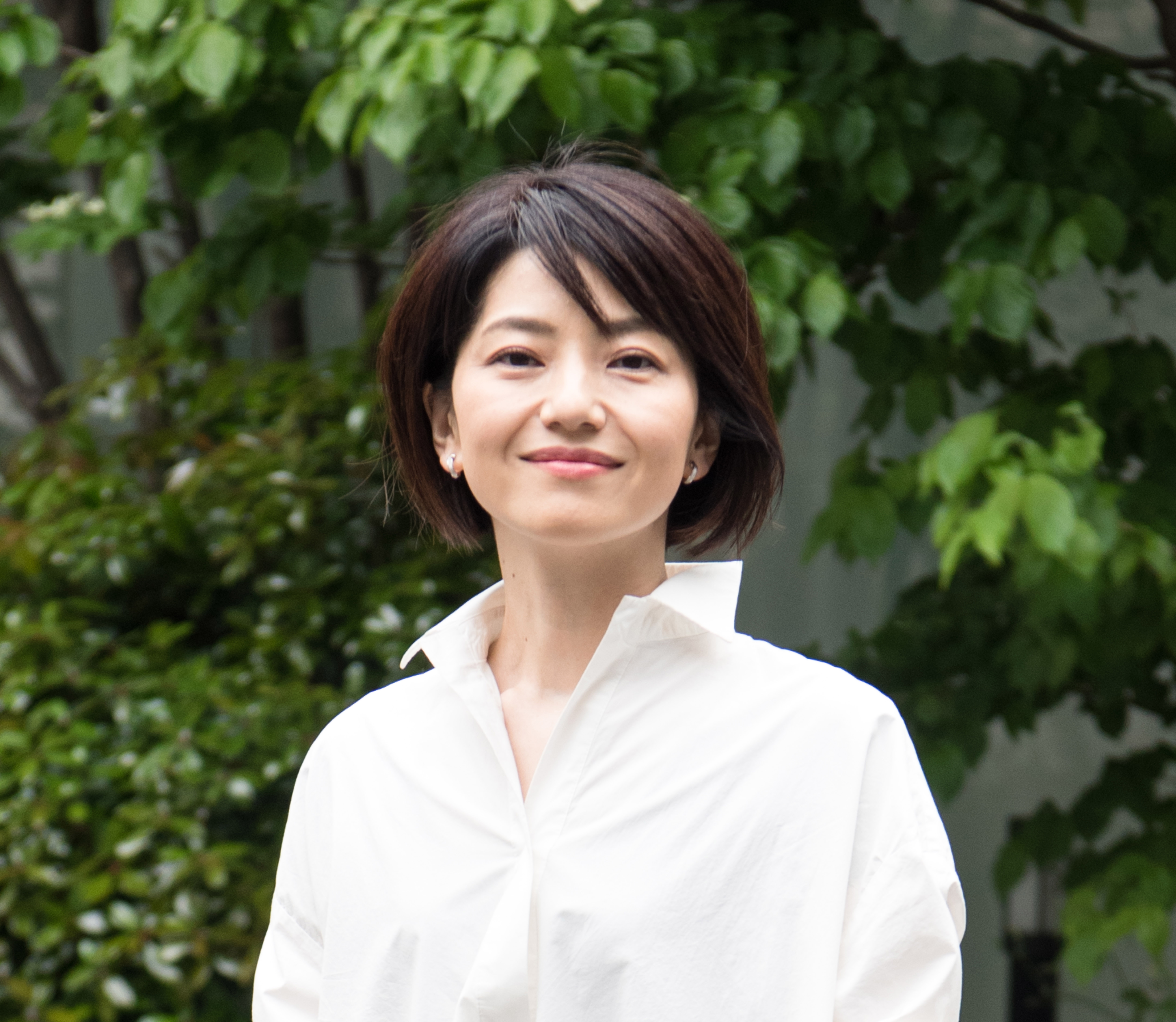 石垣のりこ氏の近影（2019年5月撮影）